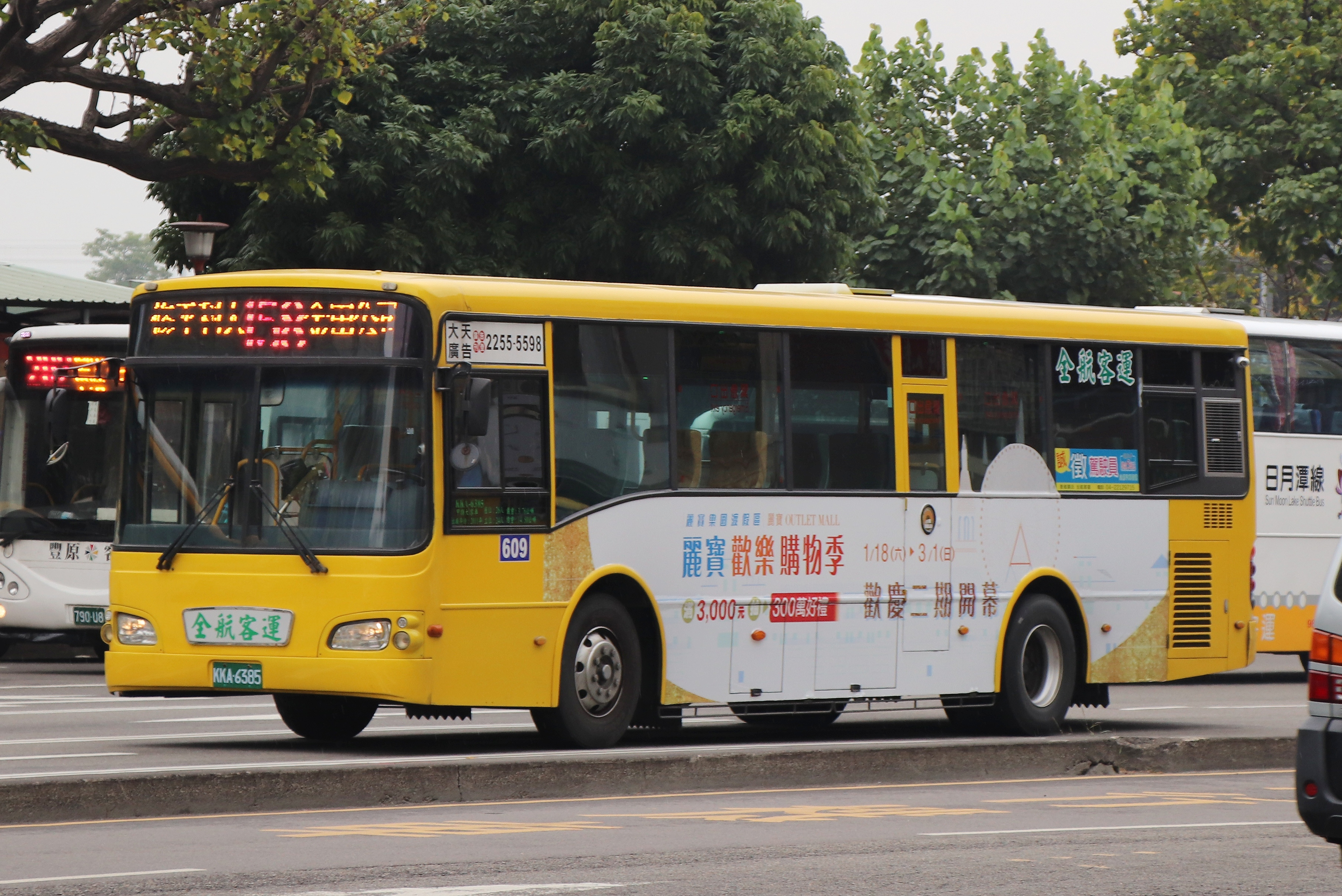 全航客運 HINO RK8JRSA大客車 KKA-6385